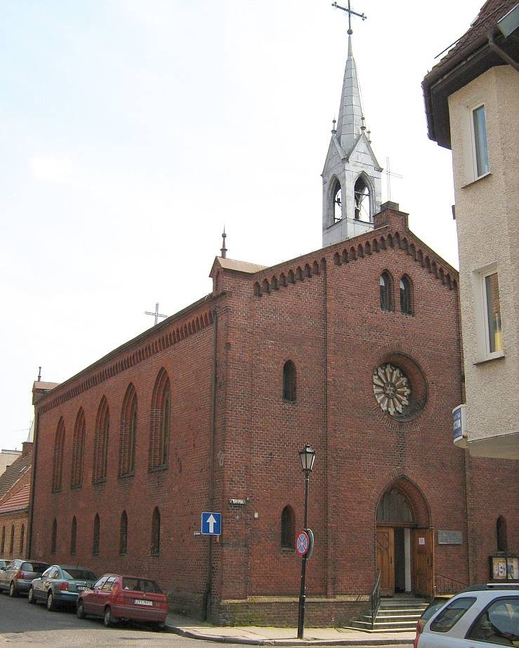 Kościół rektoralny Niepokalanego Poczęcia NMP w Kołobrzegu.